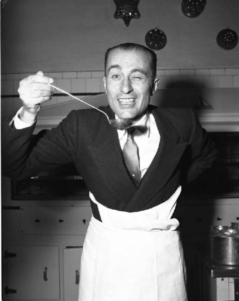 Milano - Quartiere Porta Vittoria - Trattoria toscana: interno - Ritratto maschile: Indro Montanelli giornalista con grembiule e mestolo